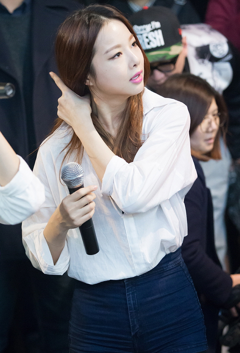 14.11.22 홍대 게릴라콘서트 EXID 솔지